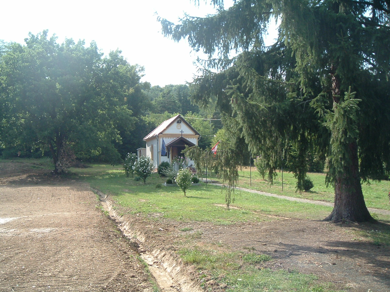 Chapel in Nemesmedves